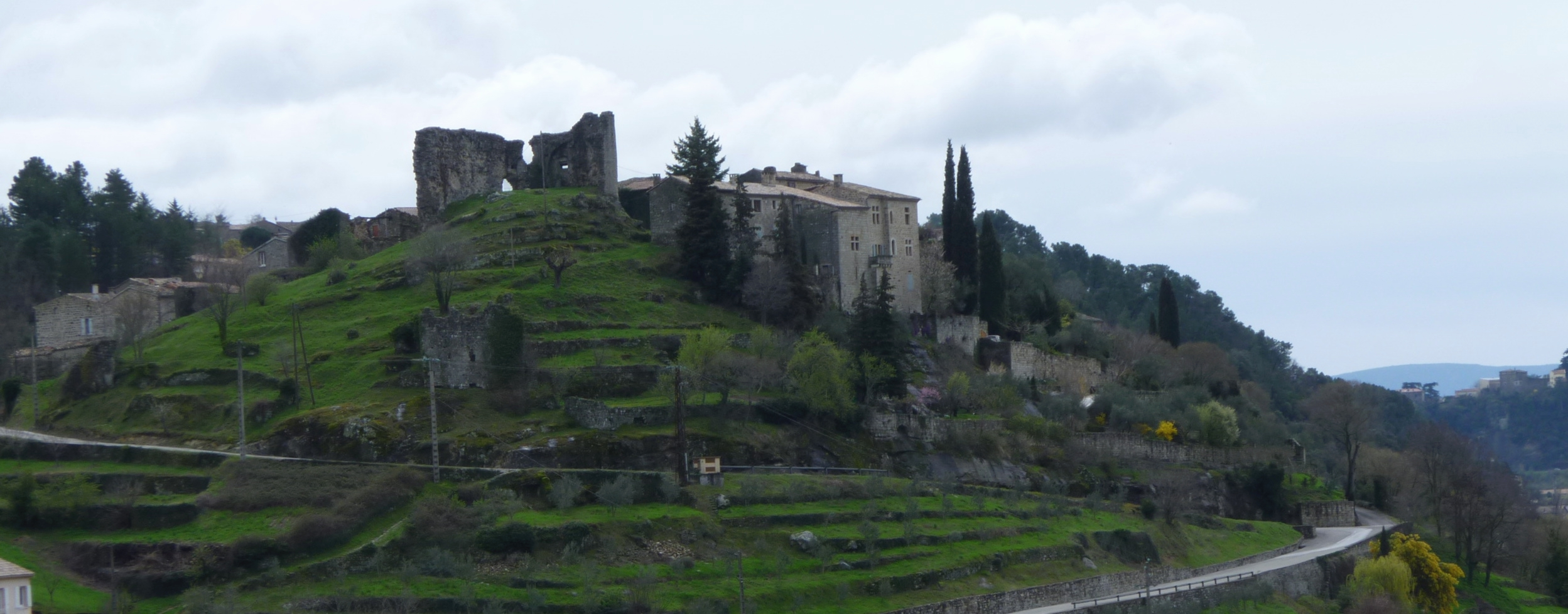 Chateau d'Ucel, Ardèche, 07, France